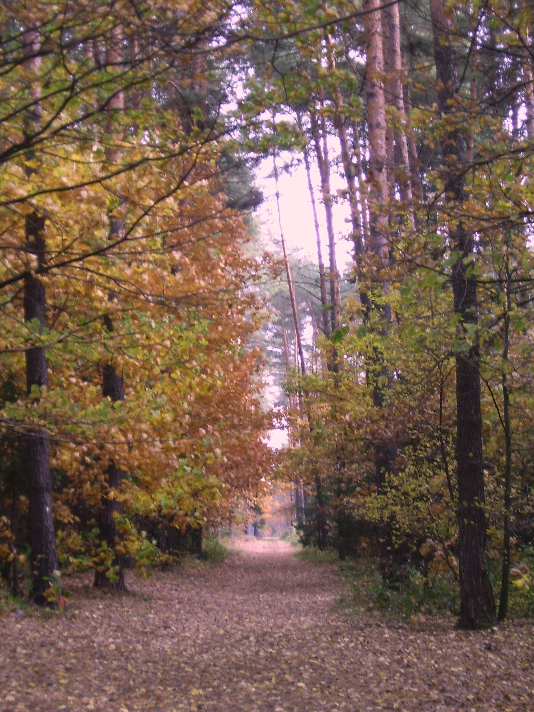 Miedzna Murowana - jesień